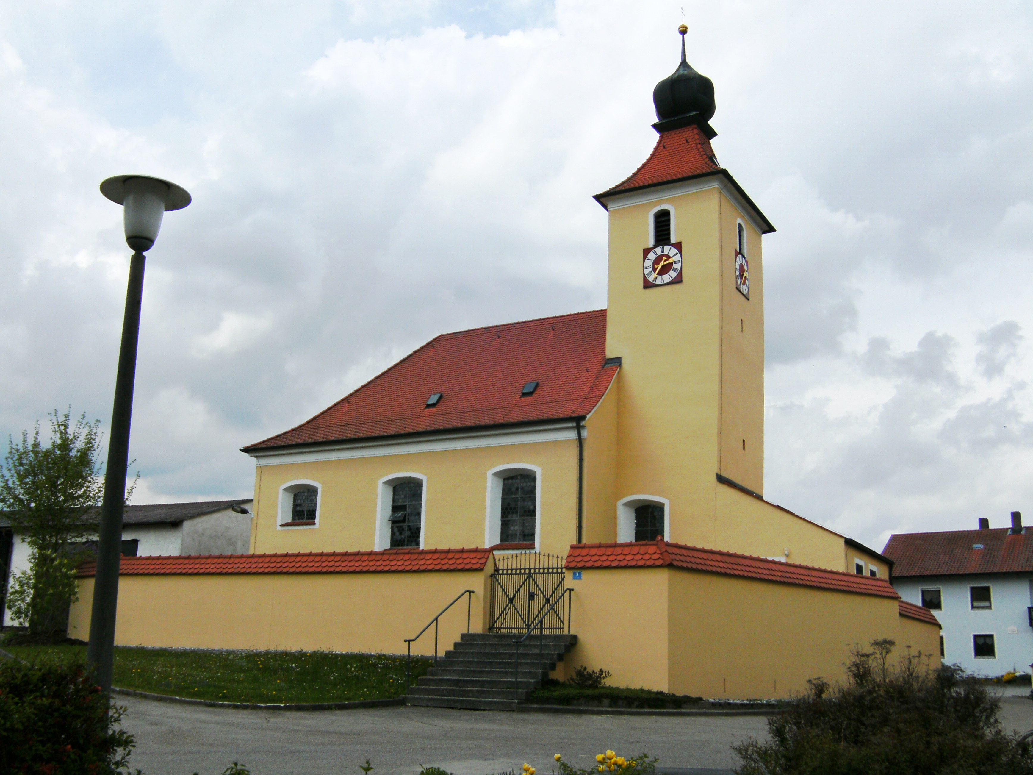 Kirche St. Georg in Bitz, Ortsteil von Denkendorf im oberbayerischen Landkreis Eichstätt